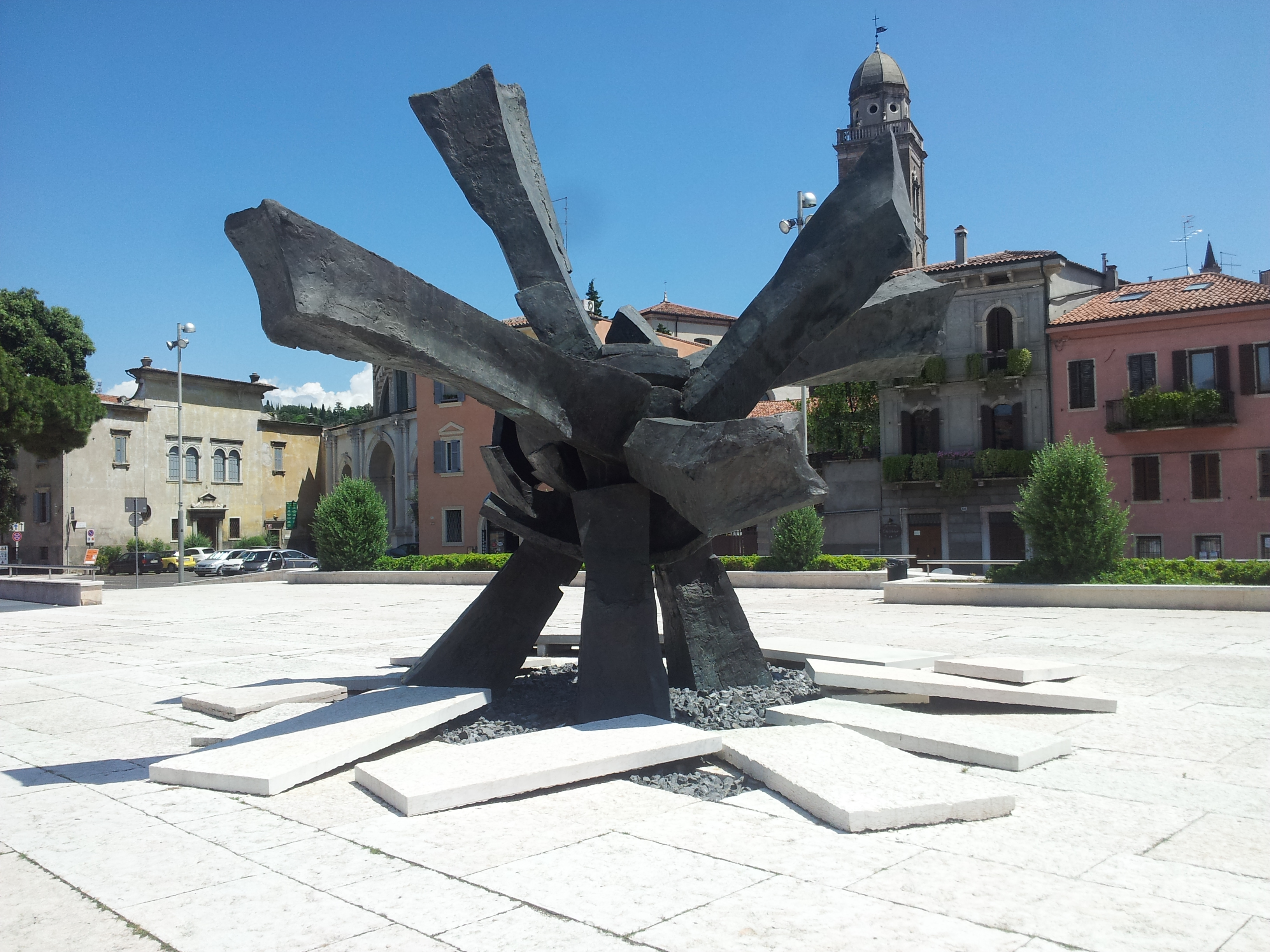 Vista laterale della scultura "Lo spino del filo spinato" di Pino Castagna in Piazza Isolo a Verona.